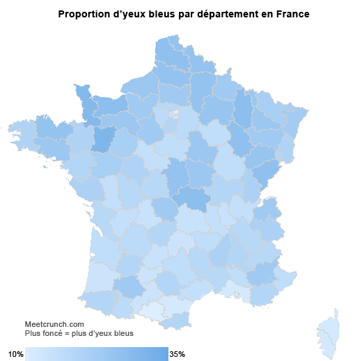 Taux de fréquence des yeux bleus dans la population française, par département